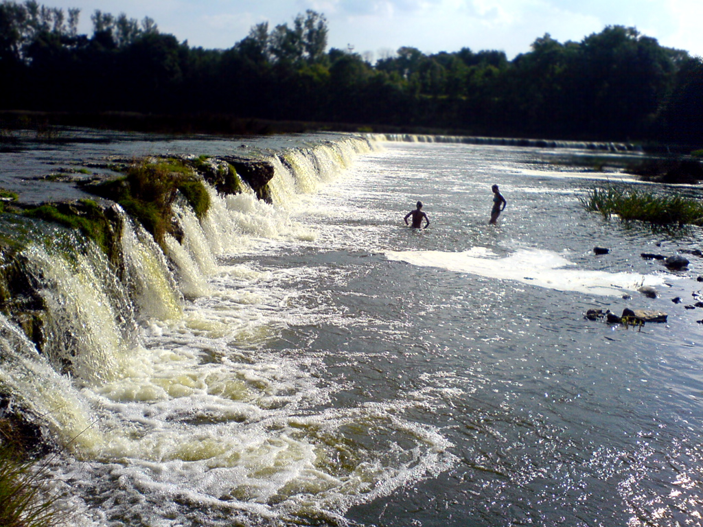 Wasserfall "Ventas Rumba" Ansicht vom Nordufer, Kuldiga, Latvija